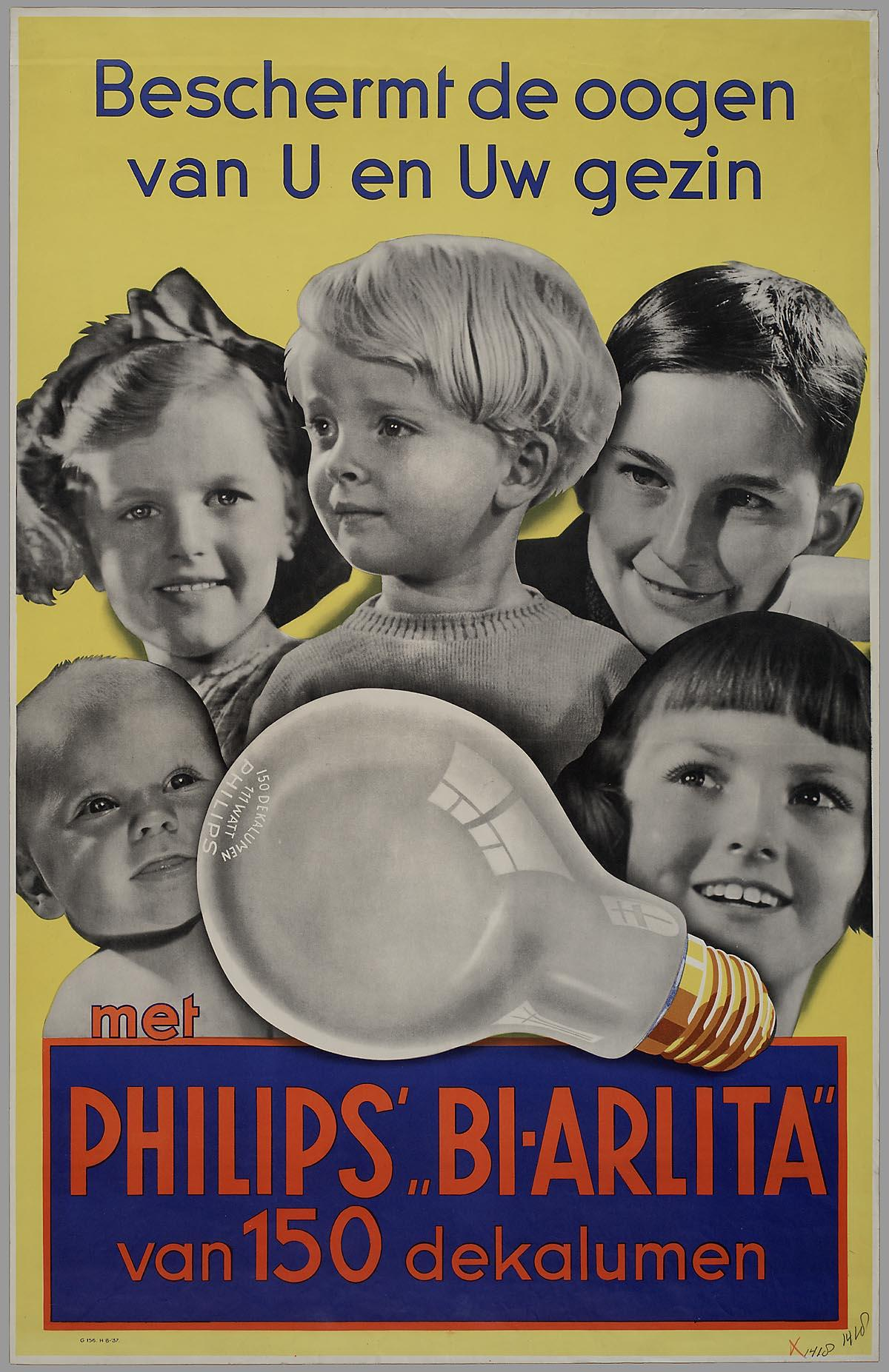 Affiche: Beschermt de oogen van U en Uw gezin met Philips' "Bi-Arlita" van 150 dekalumen